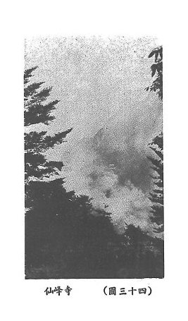 峨眉山老照片